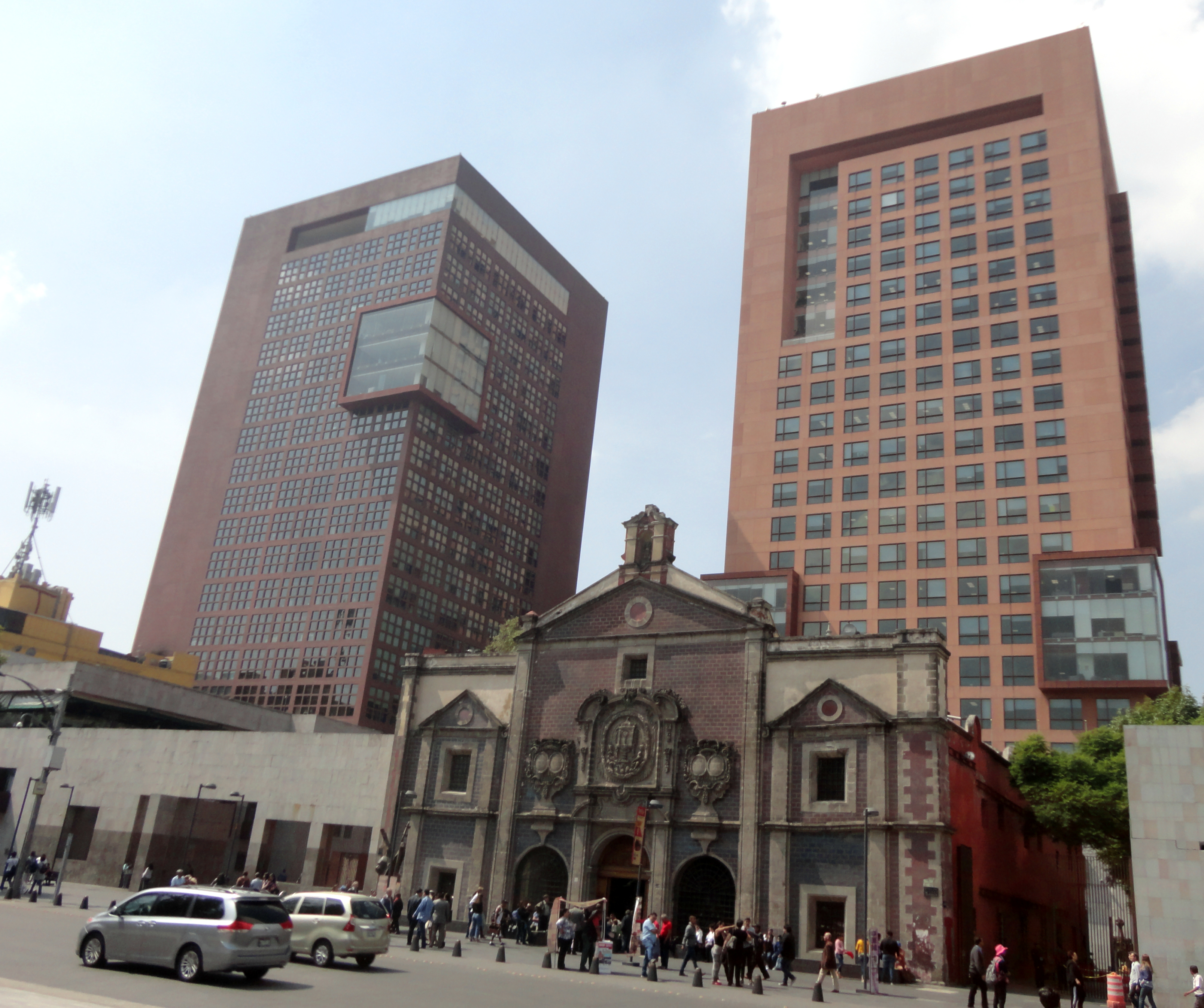 Plaza Juárez y Templo de Corpus Christi, Avenida Juárez, Ciudad de México.